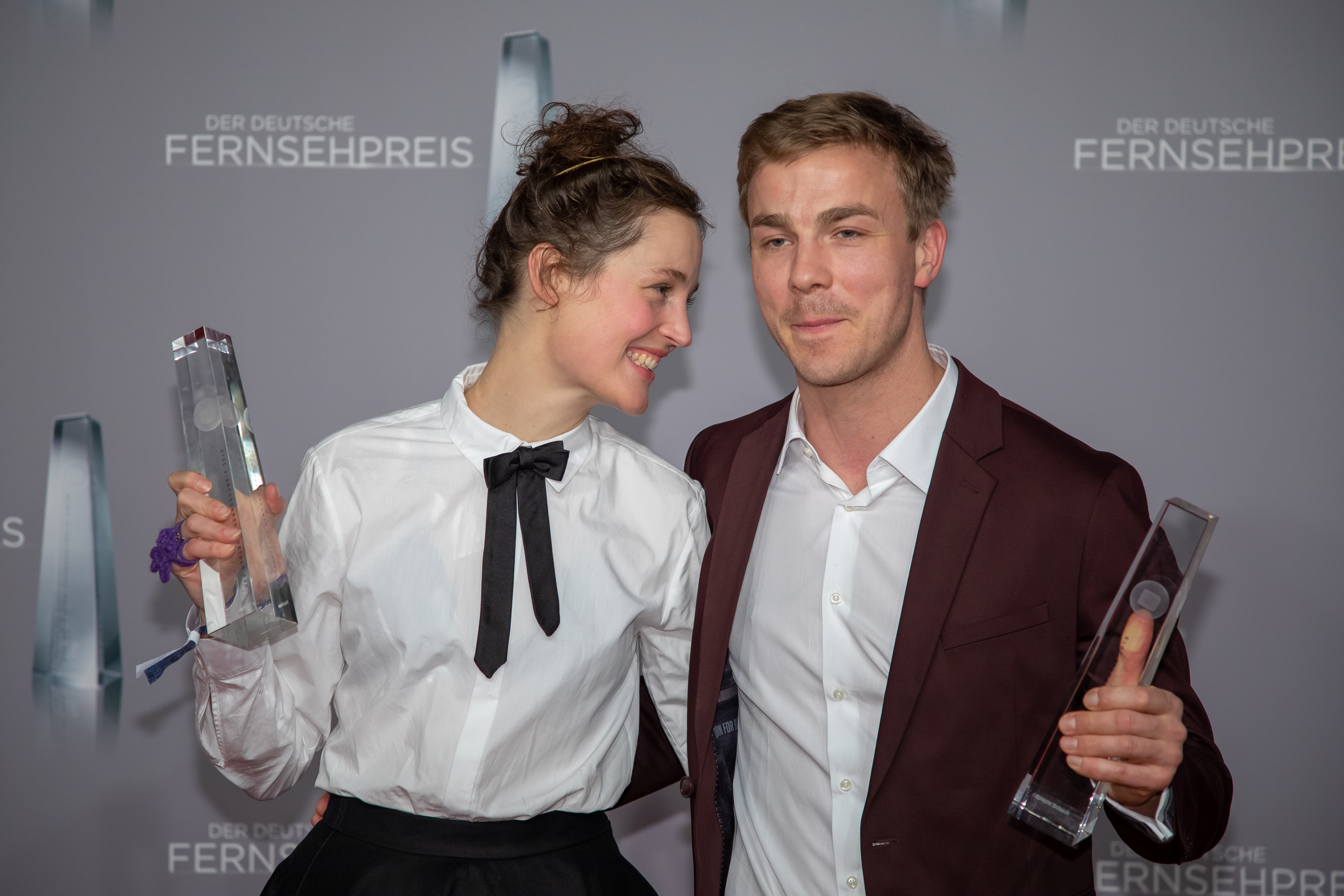 Vicky Krieps; Albrecht Schuch beim Deutschen Fernsehpreis 2019 in der Düsseldorfer Rheinterrasse